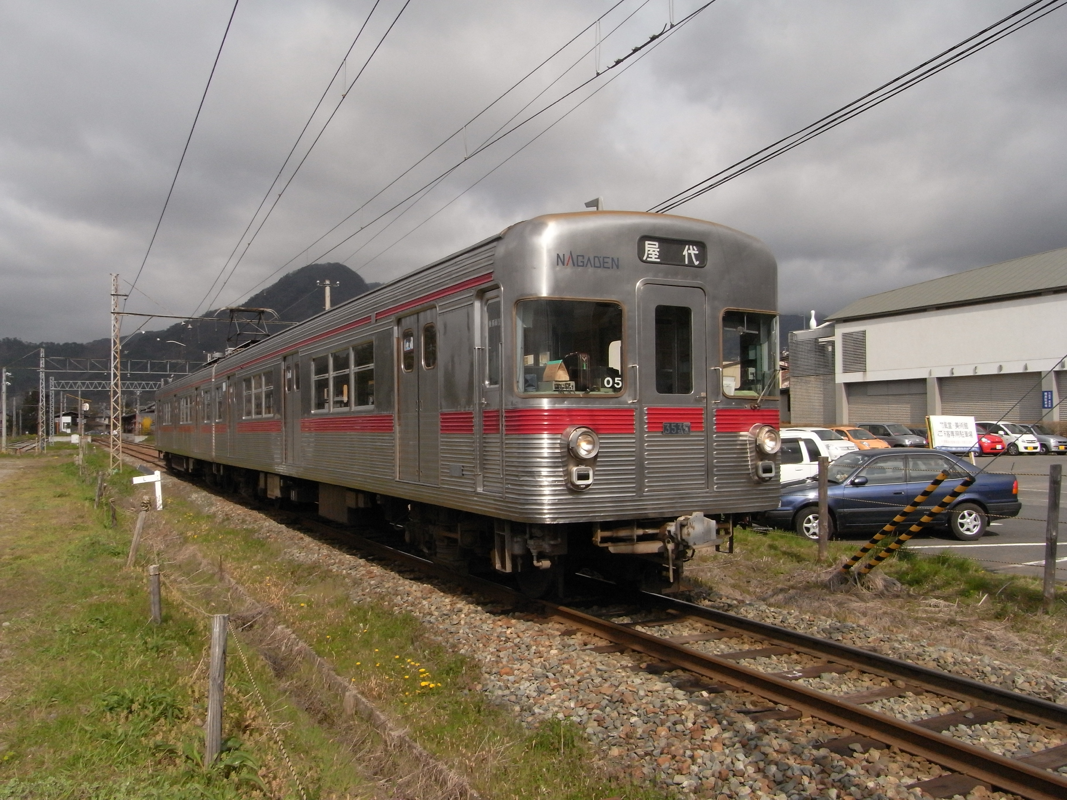 長野電鉄3500系電車